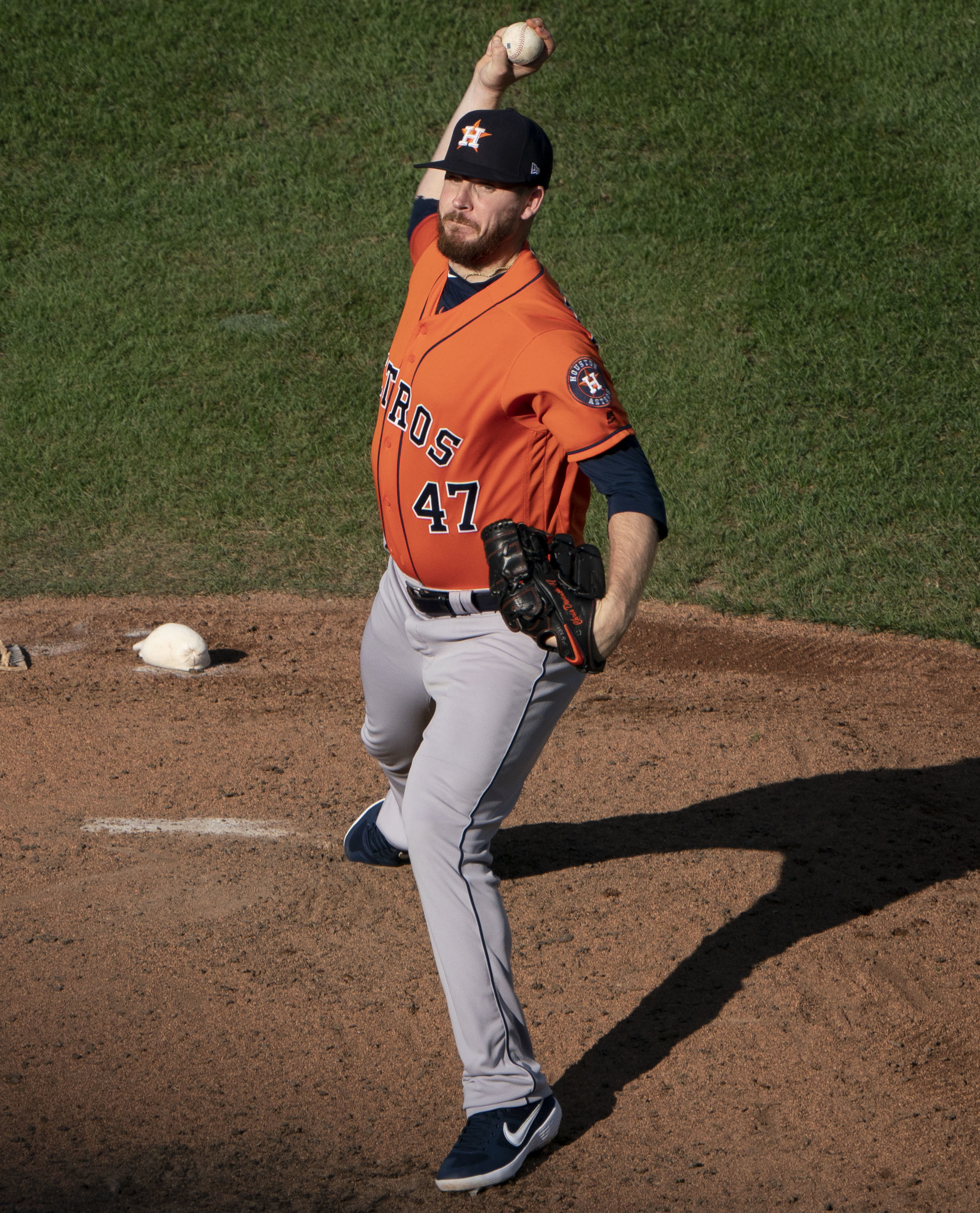 Astros at Orioles 09/30/18